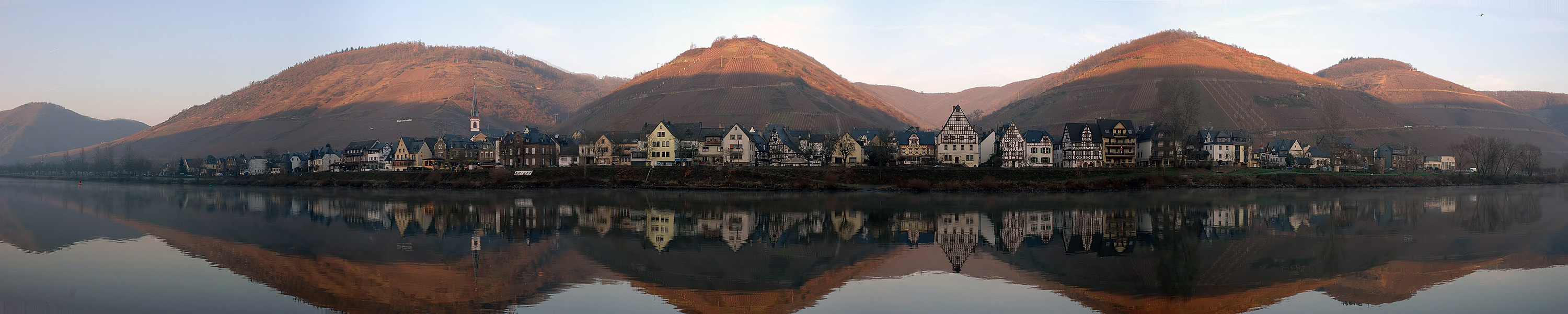 Panoramaaufnahme Ortsteil Ediger.